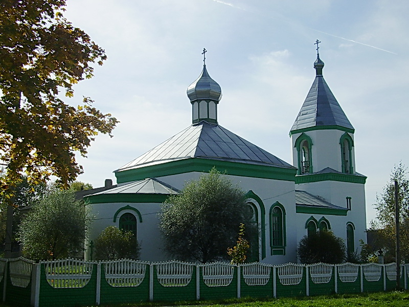 Крайск. Свята-Мікалаеўская царква